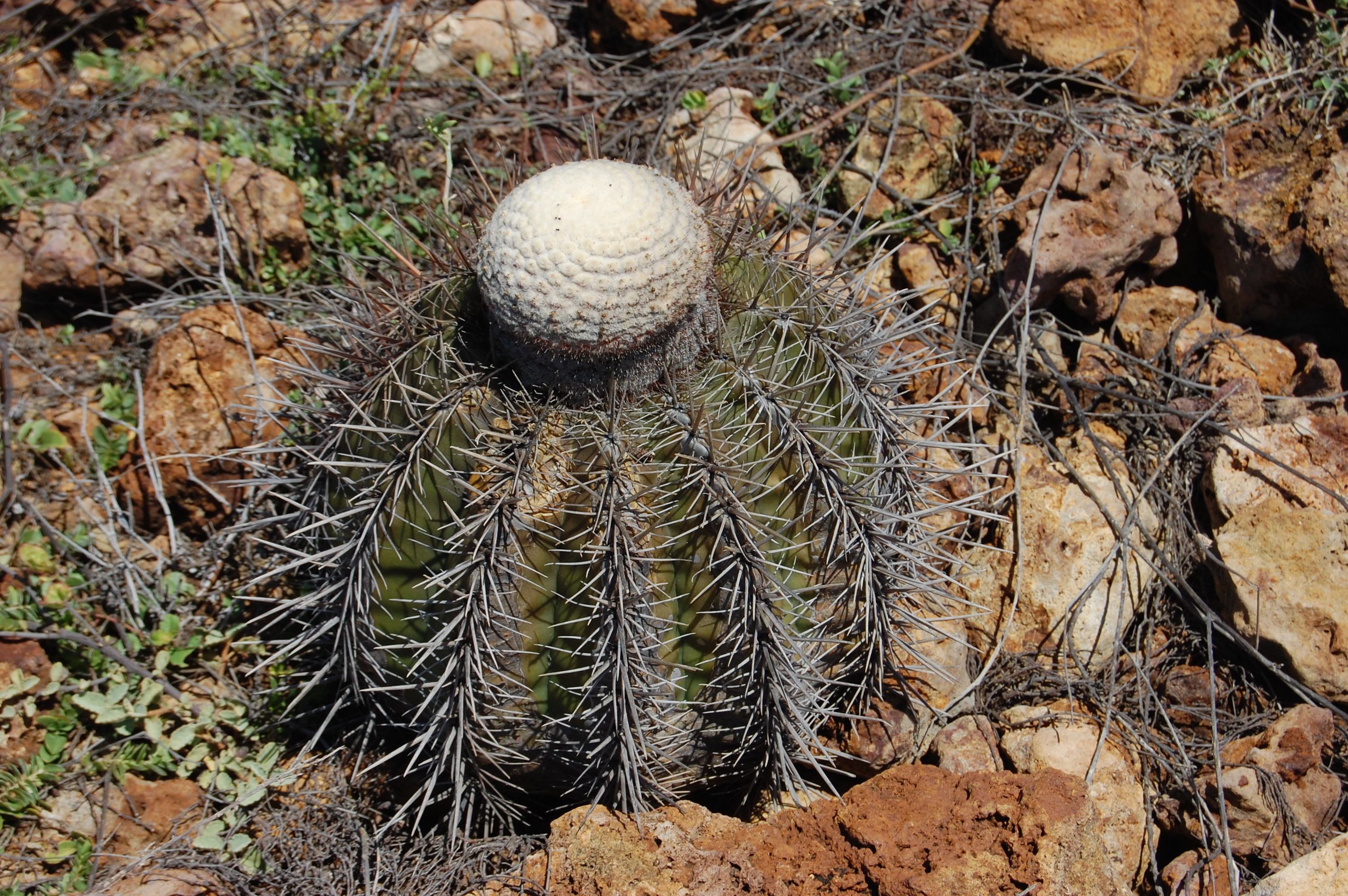 Cactus